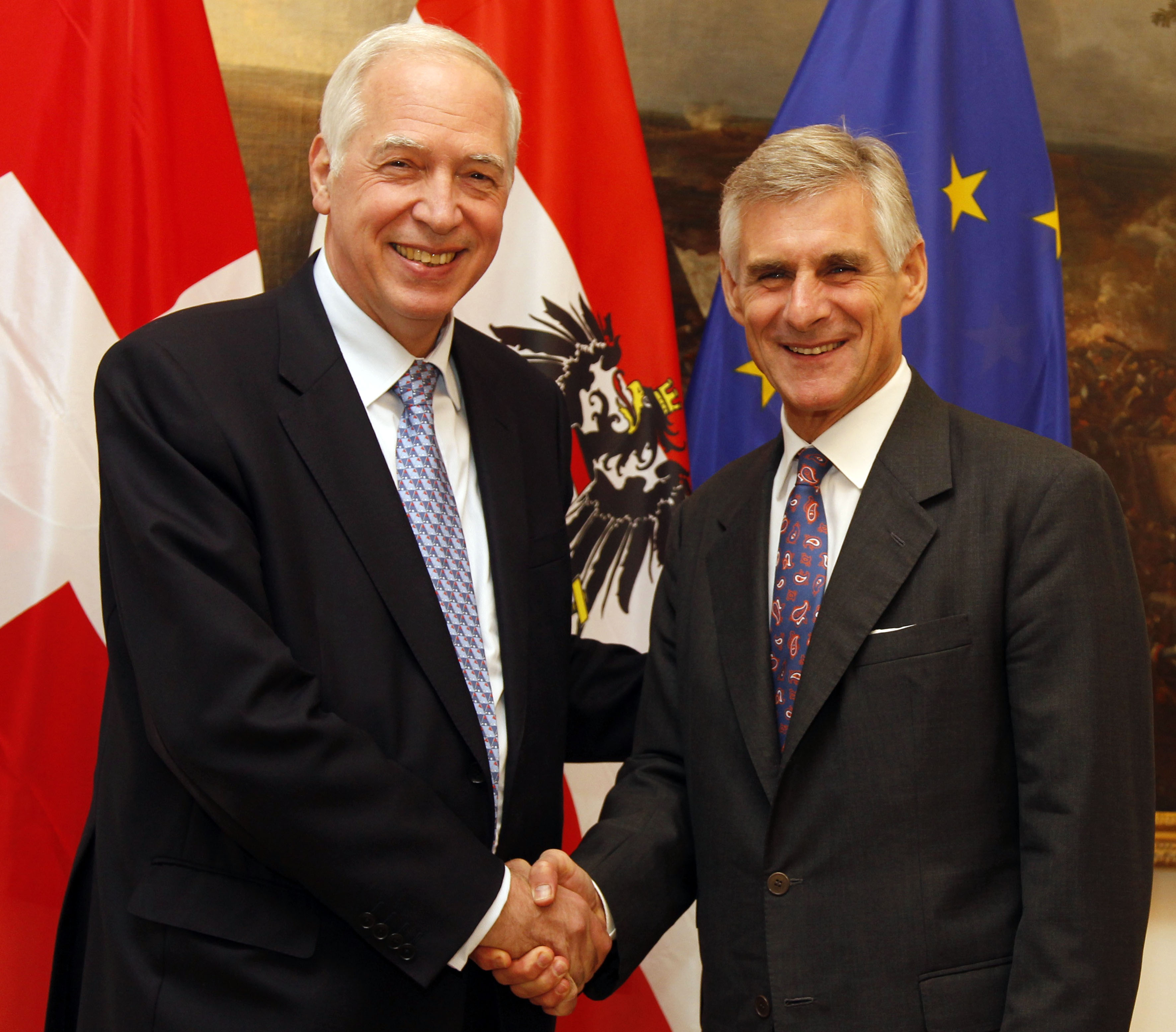 Montag, den 5. Oktober 2015 traf Generalsekretär Michael Linhart (R) im Außenministerium in Wien mit dem Staatssekretär von Schweiz Jacques de Watteville (L), zu einem Arbeitsgespräch zusammen. Foto: Mahmoud